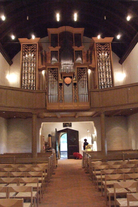 Dorfkirche Berlin-Marienfelde: Orgen Fotograf: Harald Rossa Datum: August 2006 Höher aufgelöste Version ist verfügbar